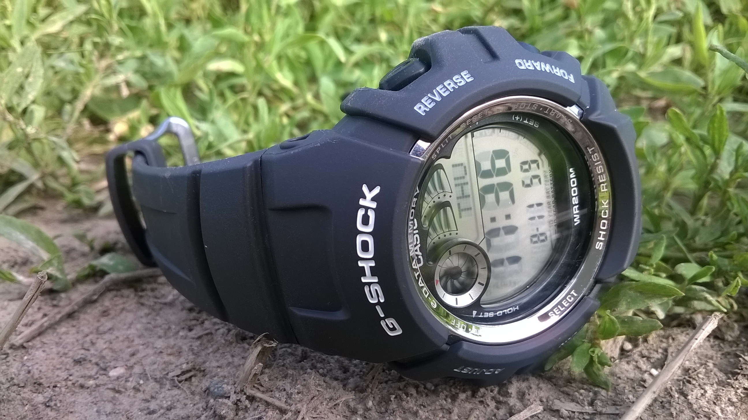 G-Shock G2900F-8VER dans la terre.